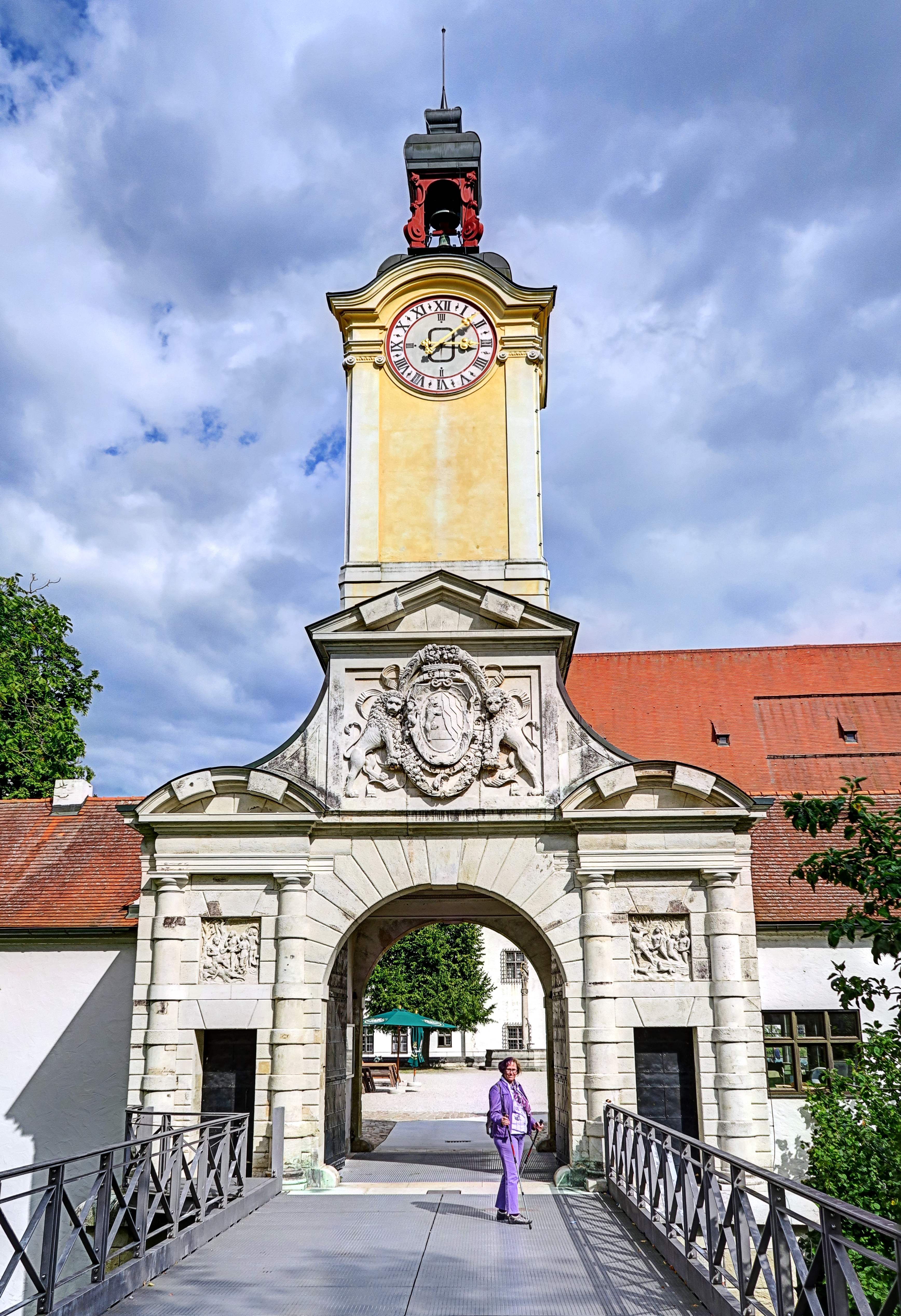 Deutschland, Bayern, Oberbayern, Ingolstadt, Portal zum 'Neunen Schloss